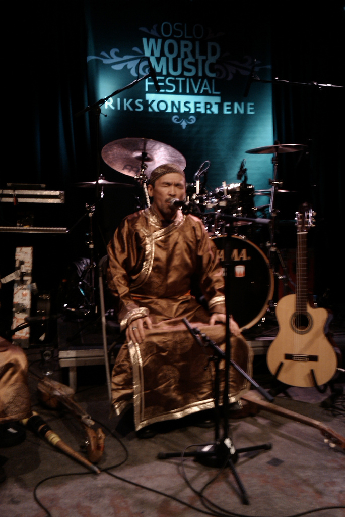 IMAG0074